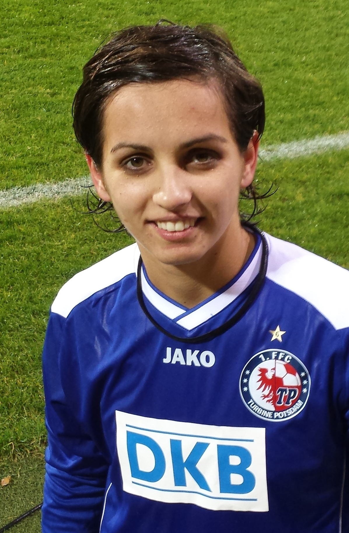 Natasha Andonova 2013